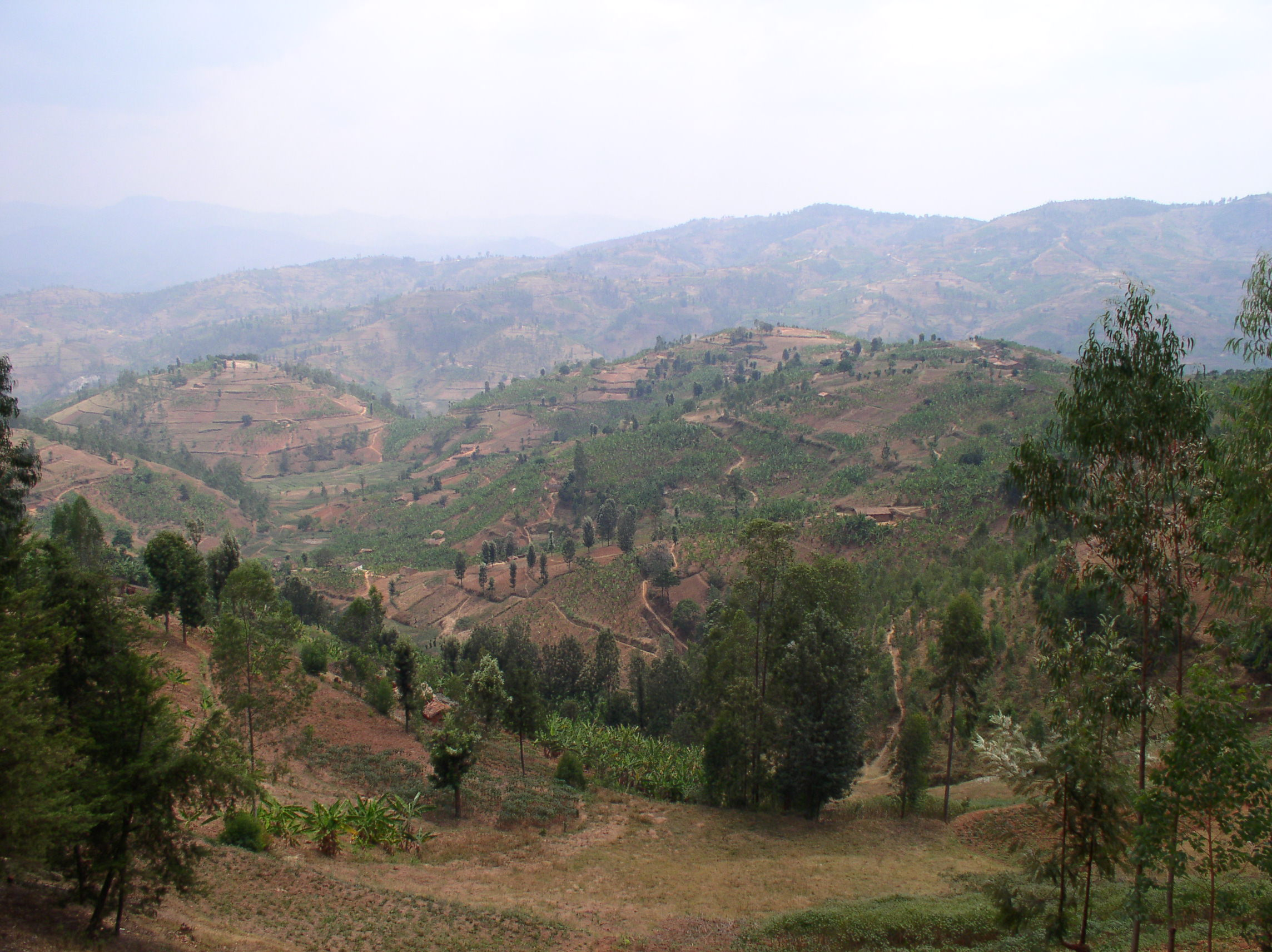 paysage du Rwanda (région de Gitarama)